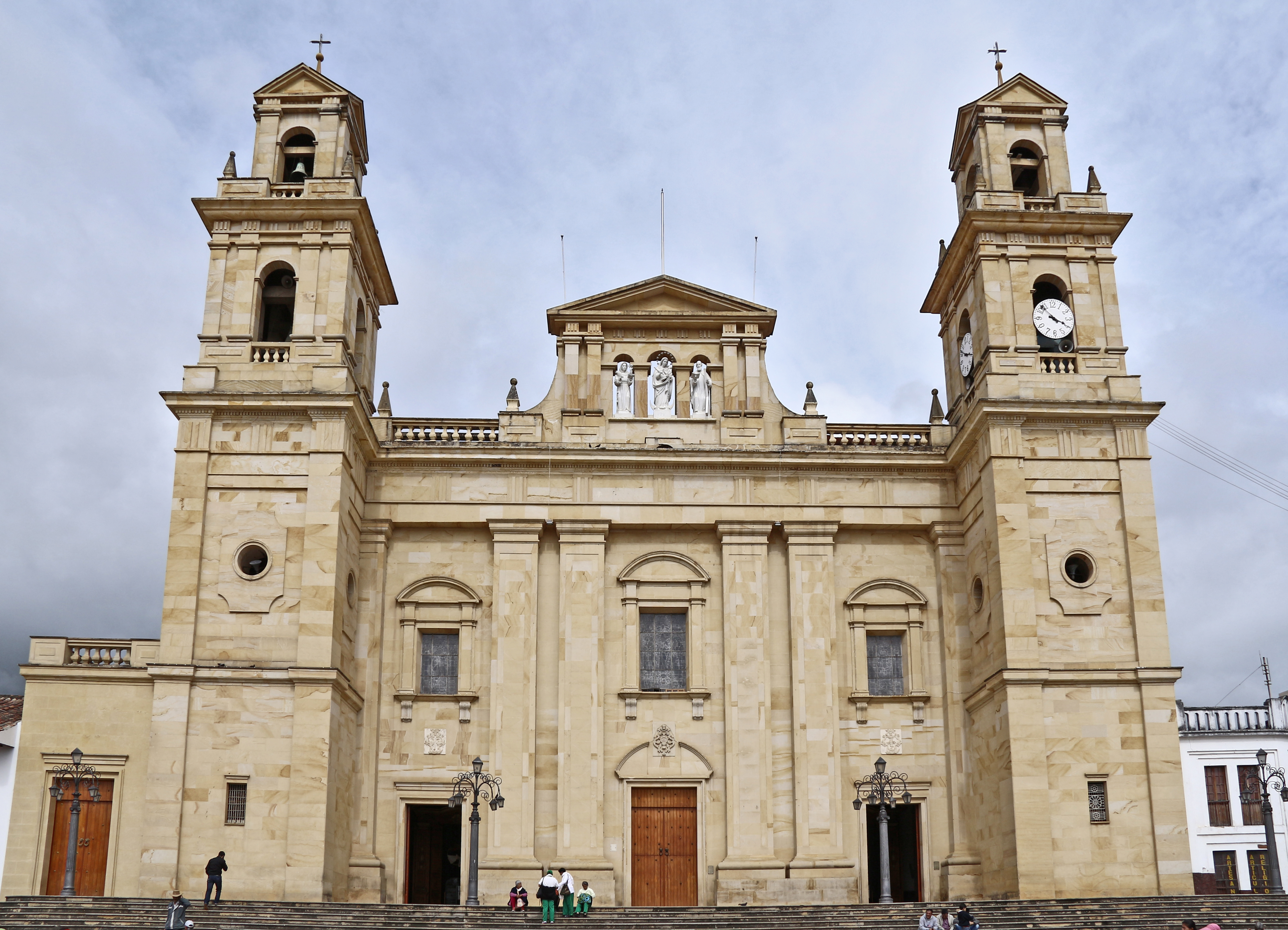 Basilica de Nuestra Señora del Rosario de Ciquinquirá. Ubicada en Chiquinquirá - Boyacá Colombia